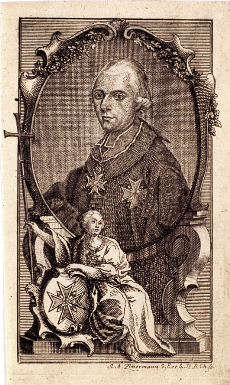 Philipp Franz Wilderich Nepomuk von Walderdorf, Fürstbischof von Speyer (1739-1810)